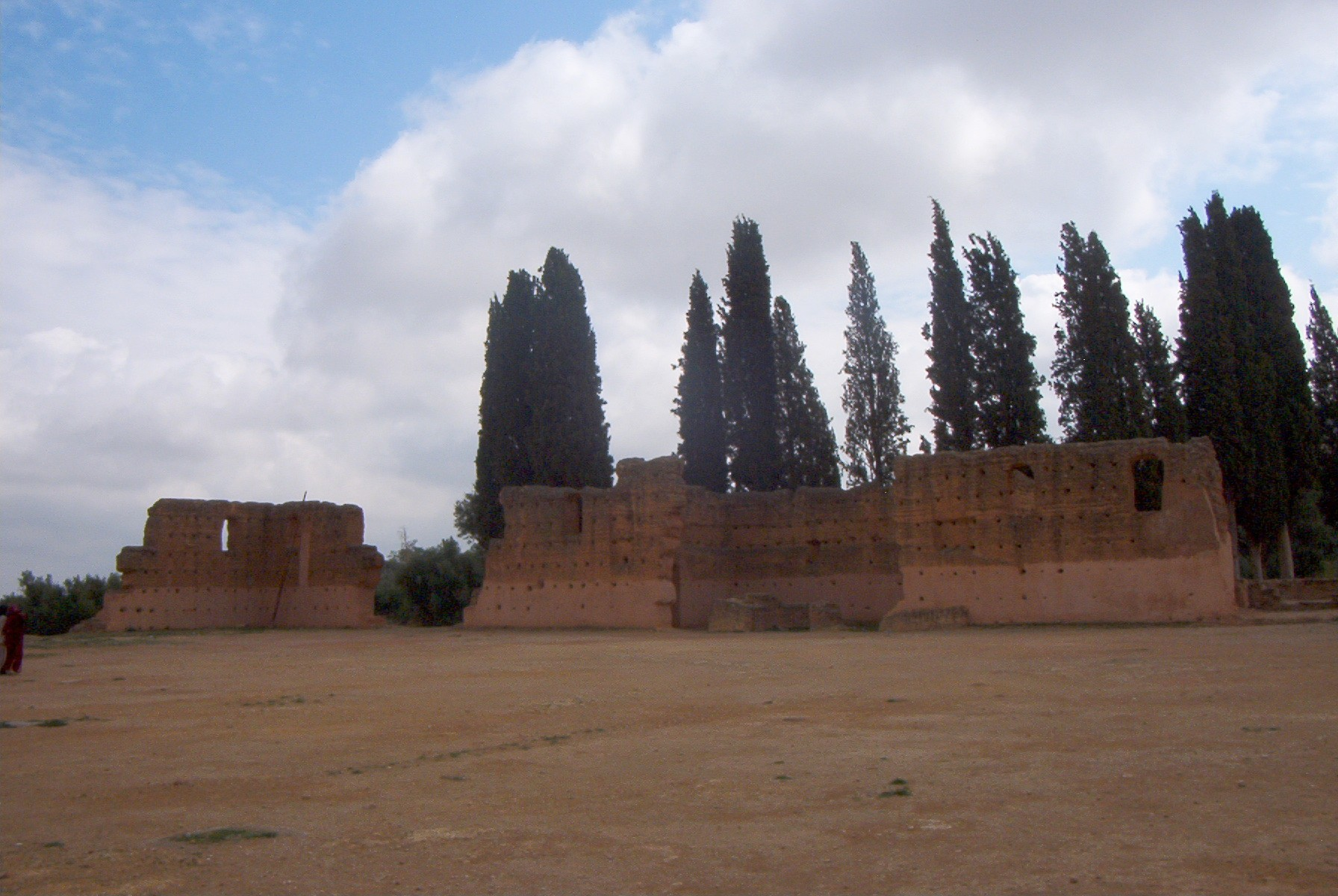 Enceinte de Mansourah à Tlemcen